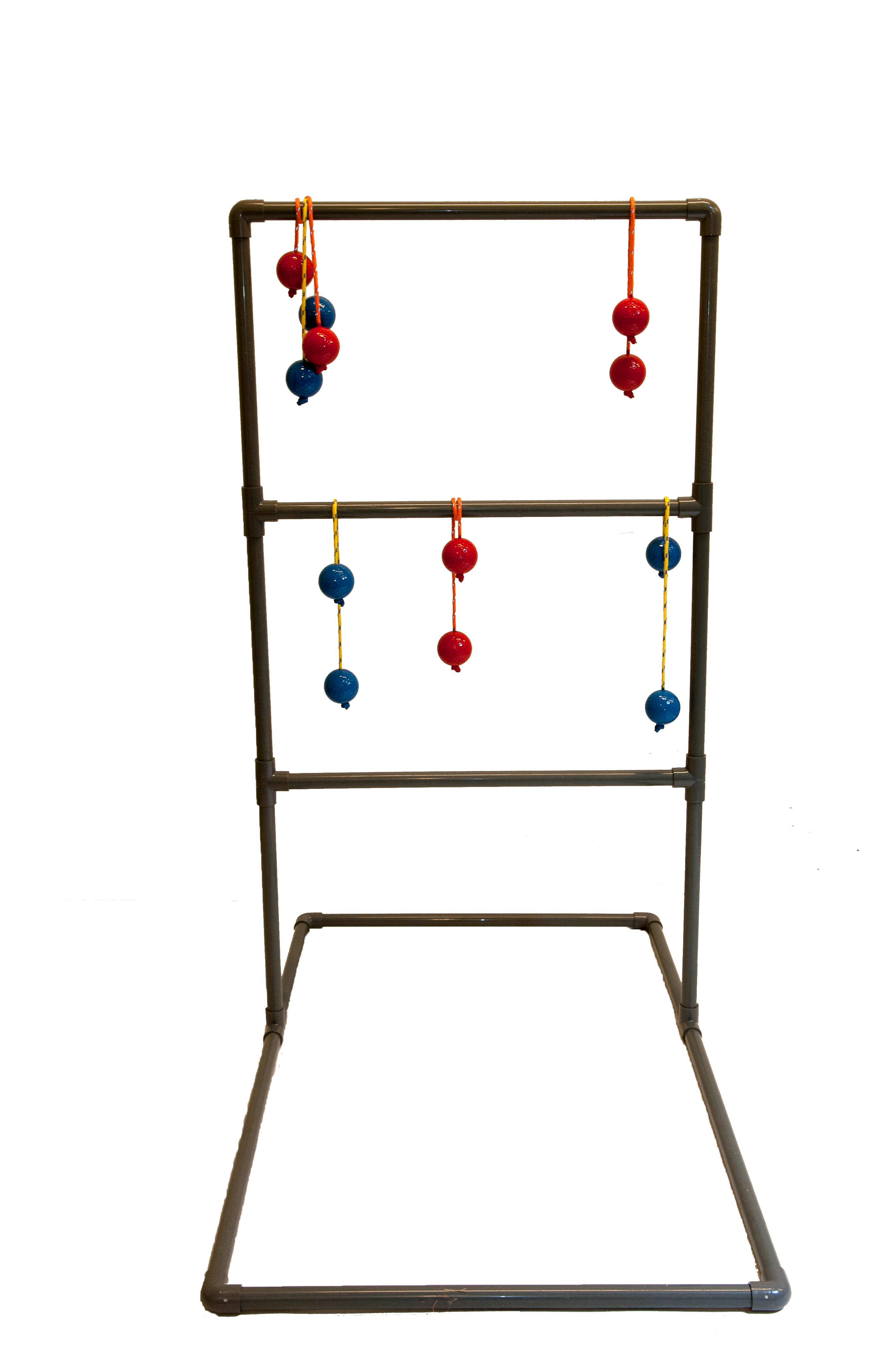 Heittopeli, jossa narupallot heitetään roikkumaan pelitelineeseen